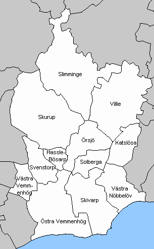 Socken in Skurup